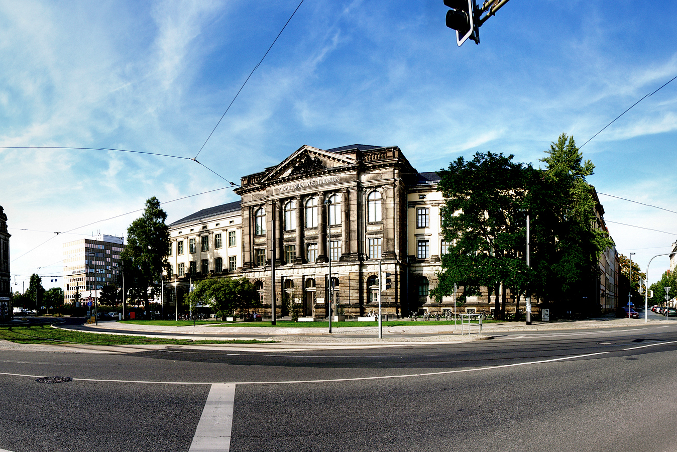 Wettiner Platz in Dresden. Ehem. Wettiner Gymnasium, heute Gebäude der Hochschule für Musik „Carl Maria von Weber“